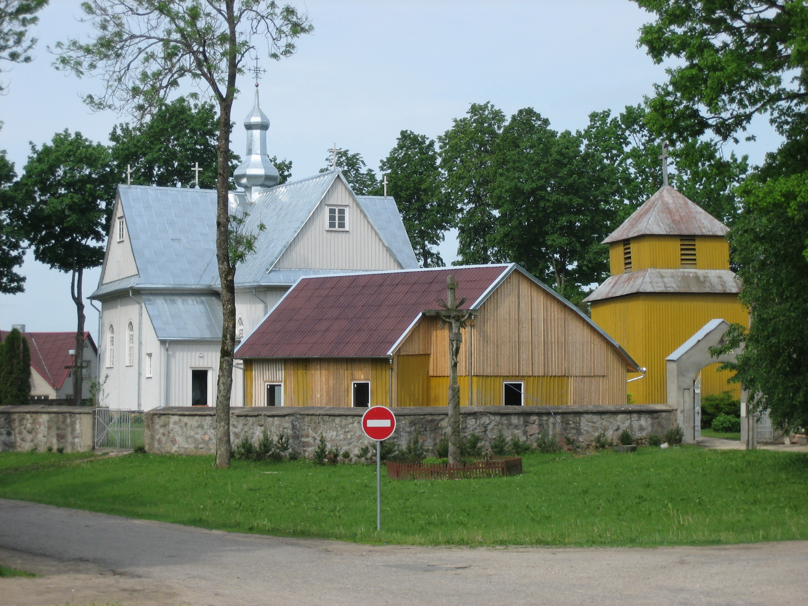 Tenenių Šv. Barboros bažnyčia